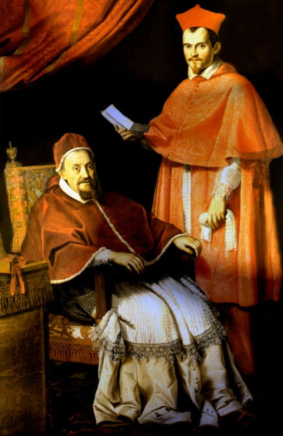 Gregório XV, Papa